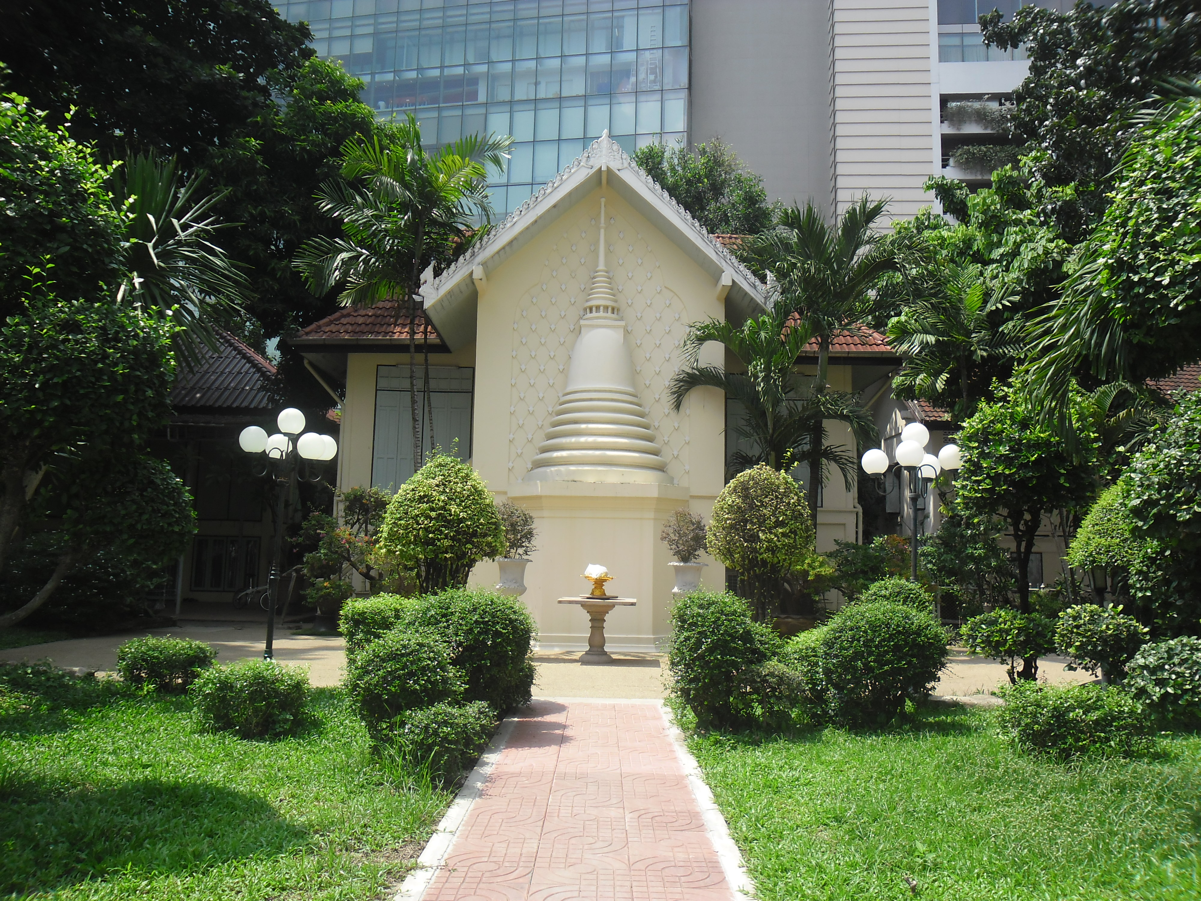 อนุสรณ์สถานราชสกุลมหิดล ณ วัดปทุมวนารามราชวรมหาวิหาร